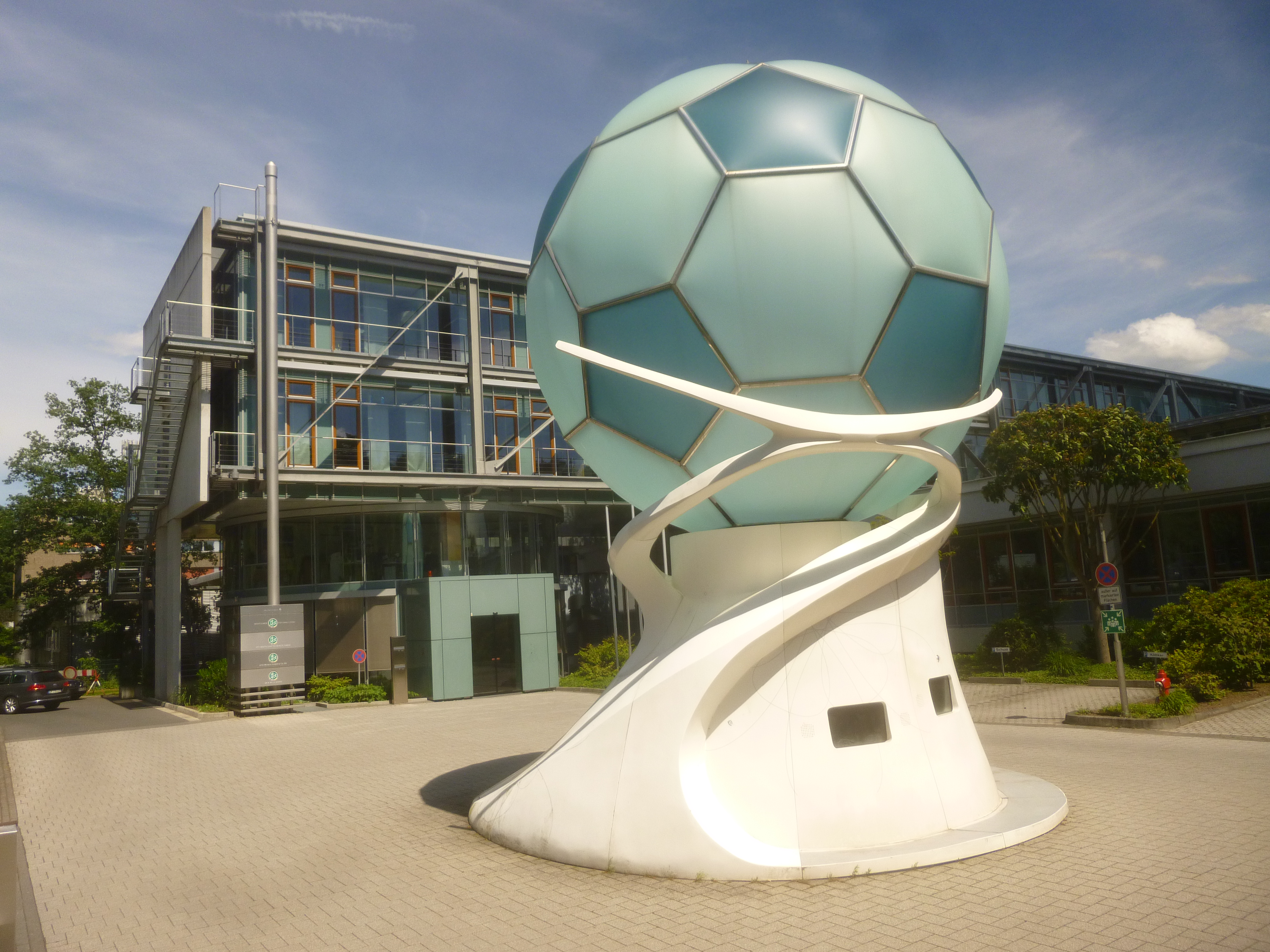 Bundesgeschäftstelle des Deutschen Fußball-Bunds in Frankfurt am Main im Juni 2013